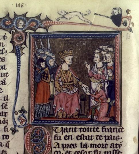 César reçoit les messagers enluminure origine BNF